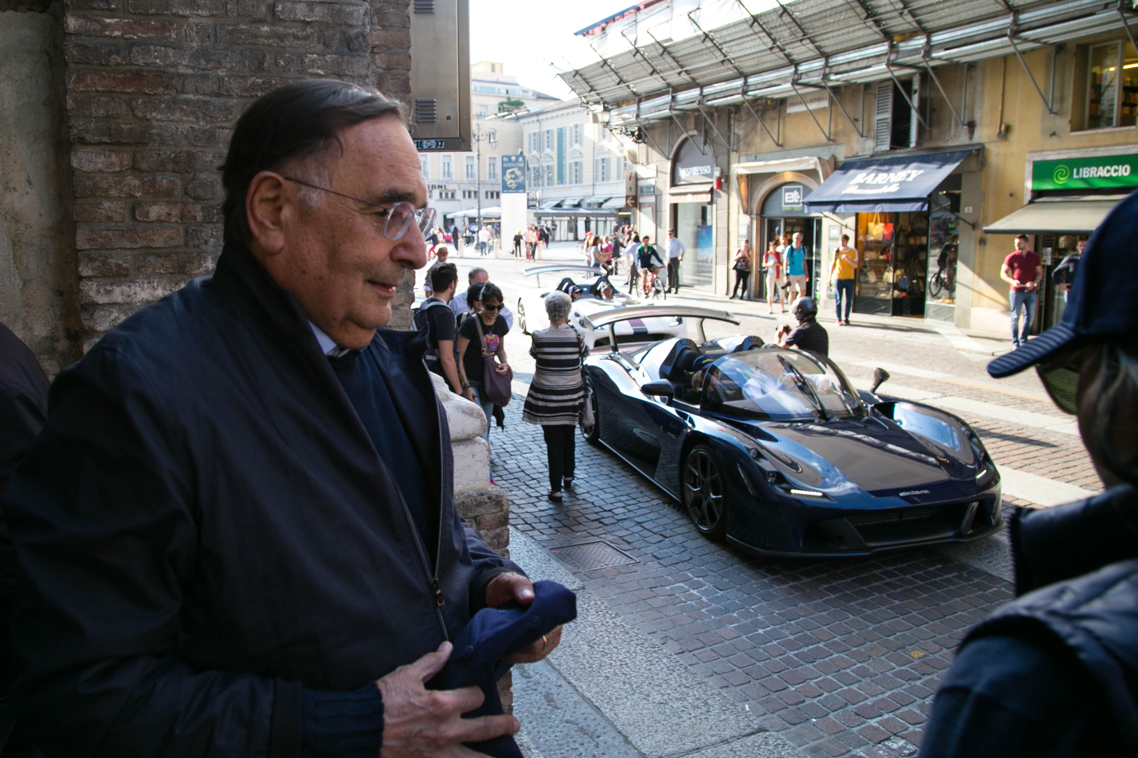 2018 05 18 Dallara Millemiglia-10